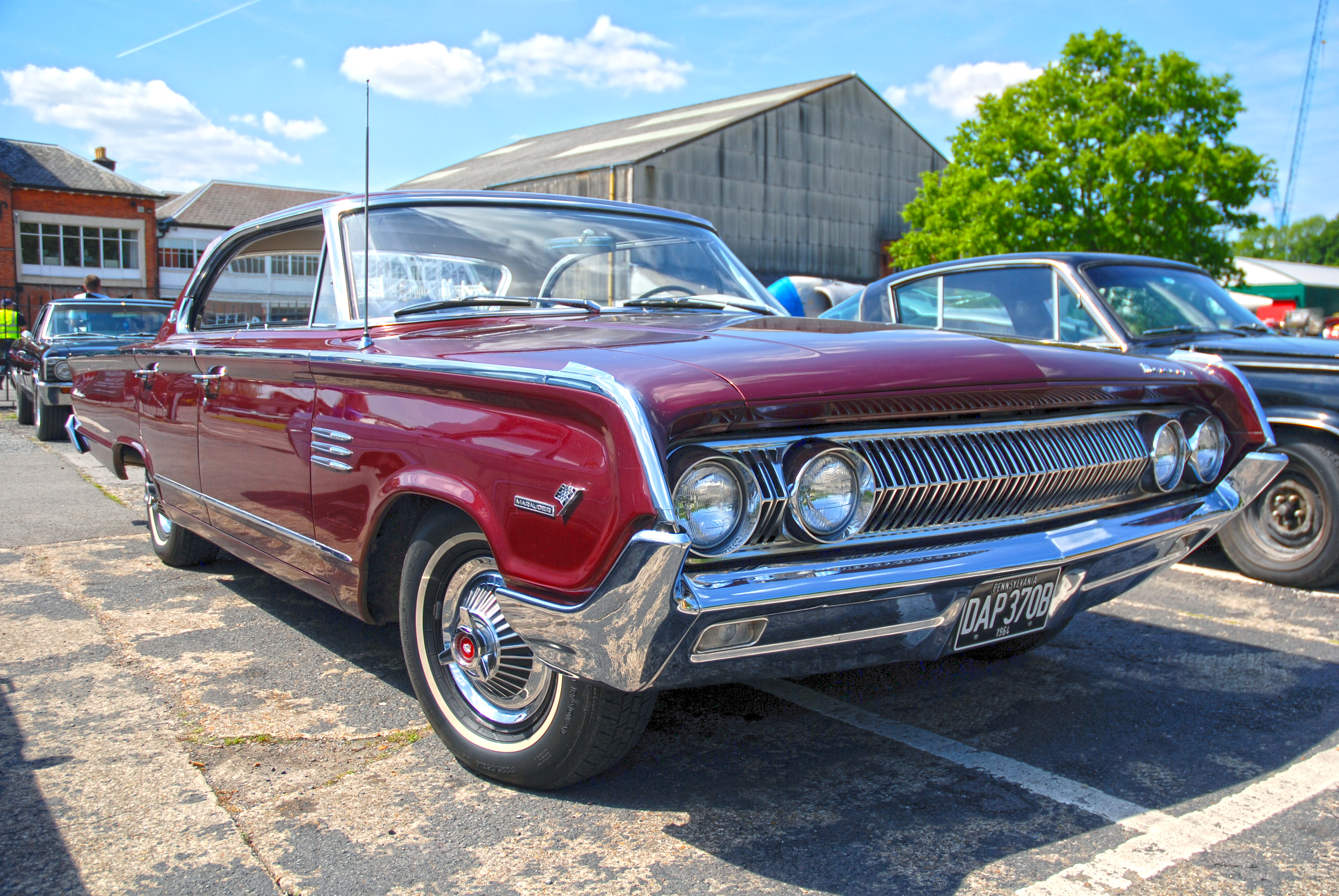 Brooklands,May 2013